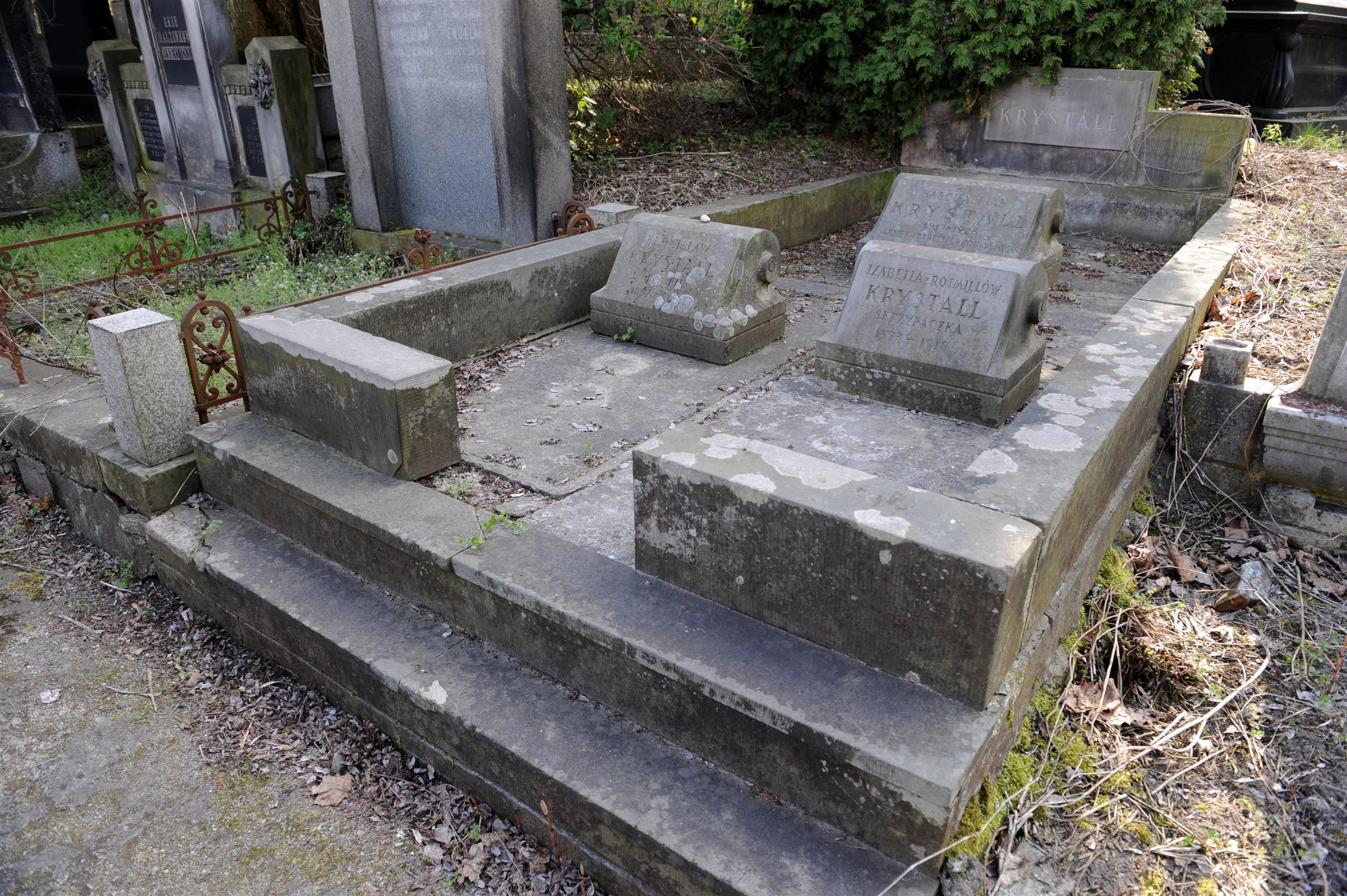 Grób Bronisława Krystalla na Cmentarzu Żydowskim w Warszawie